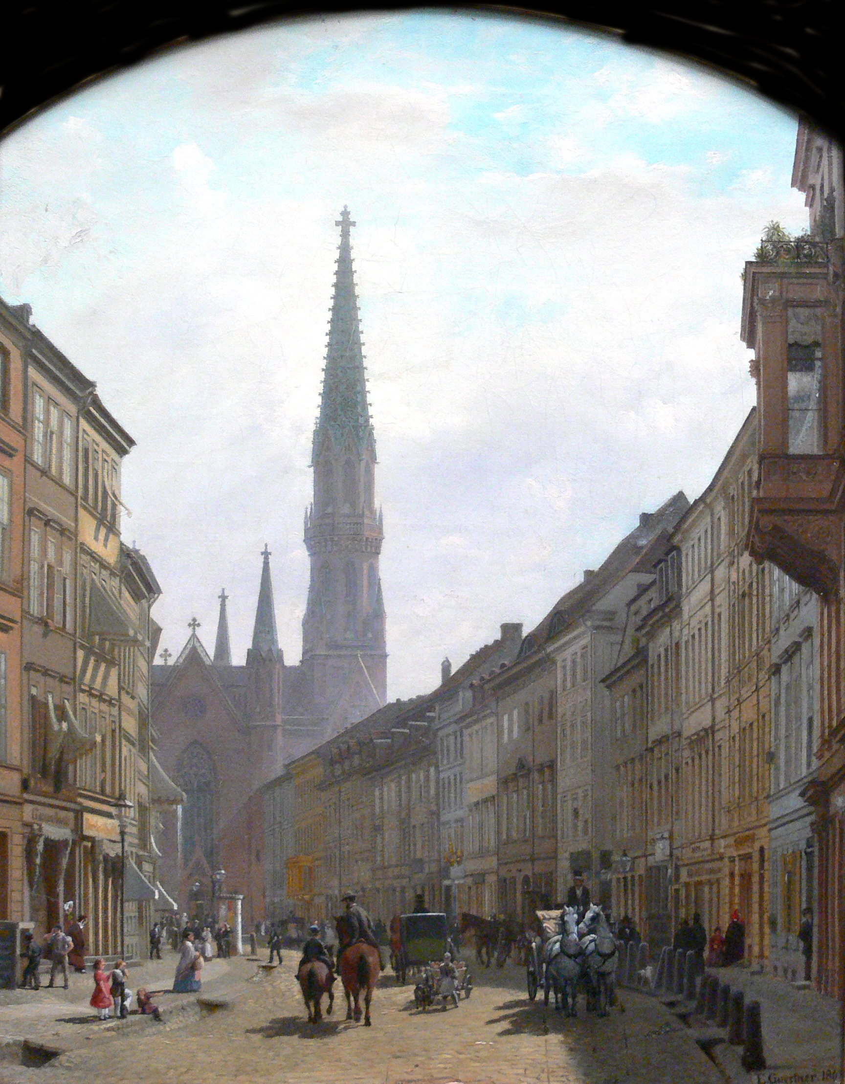 Eduard Gaertner: Brüderstraße (Spreeinsel, Berlin-Mitte, im Hintergrund die Petrikirche)